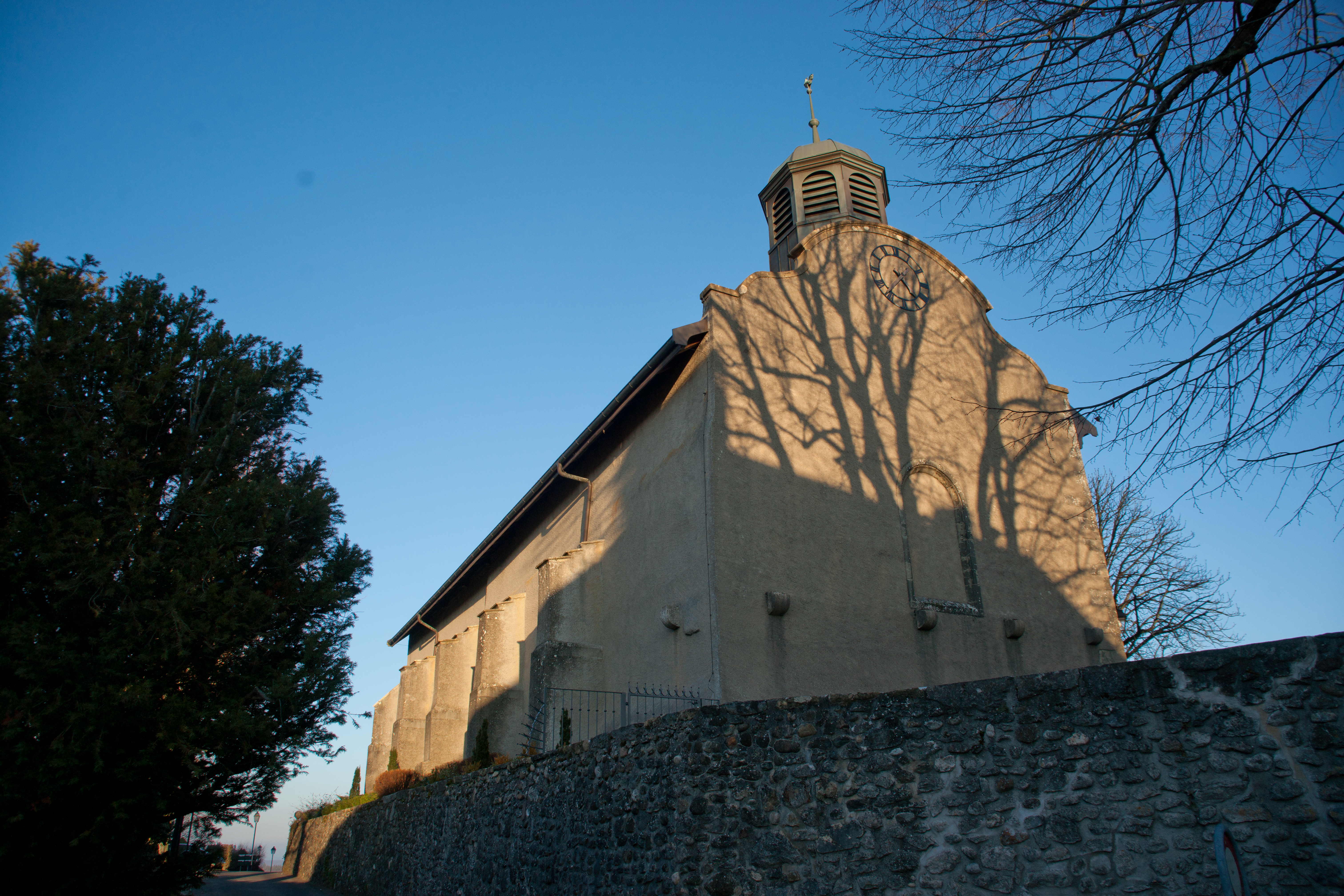 Eglise de Pampigy.